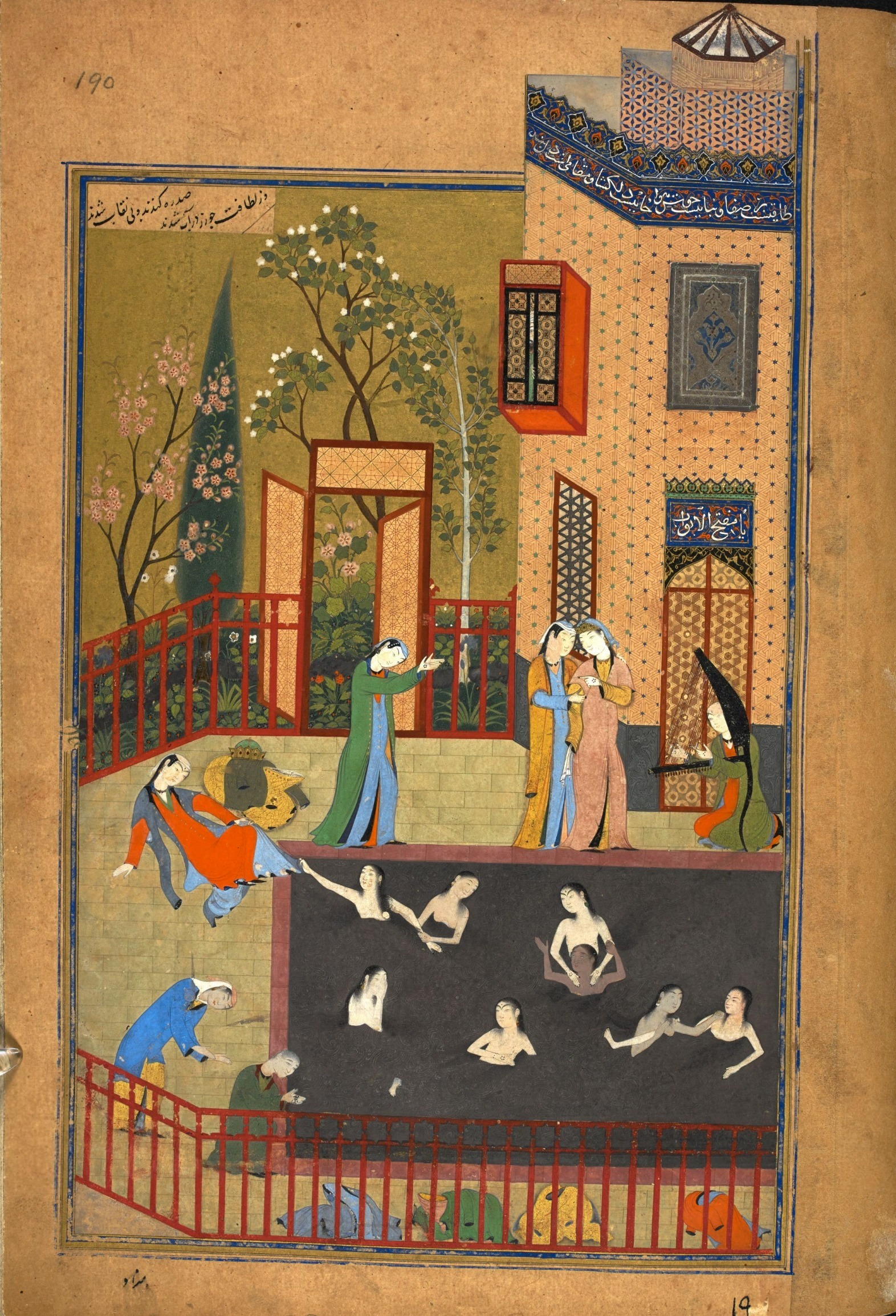 Behzad._Искандер_и_сирены._Хамсе_Низами_1495-6